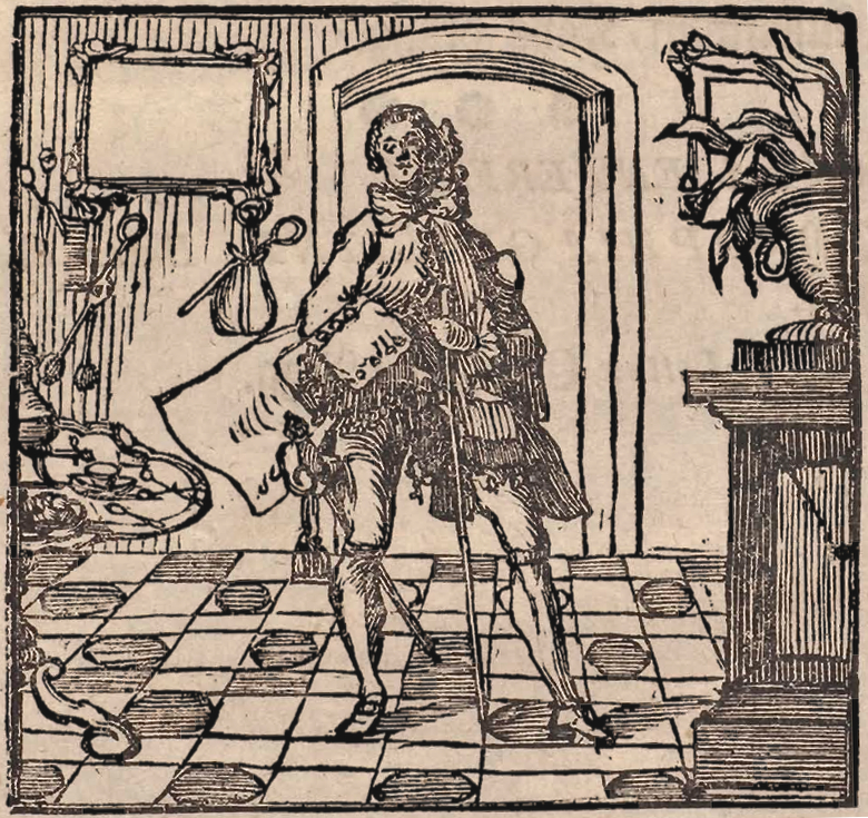 Illustration från titelsidan till Swenska Sprätthöken från 1740